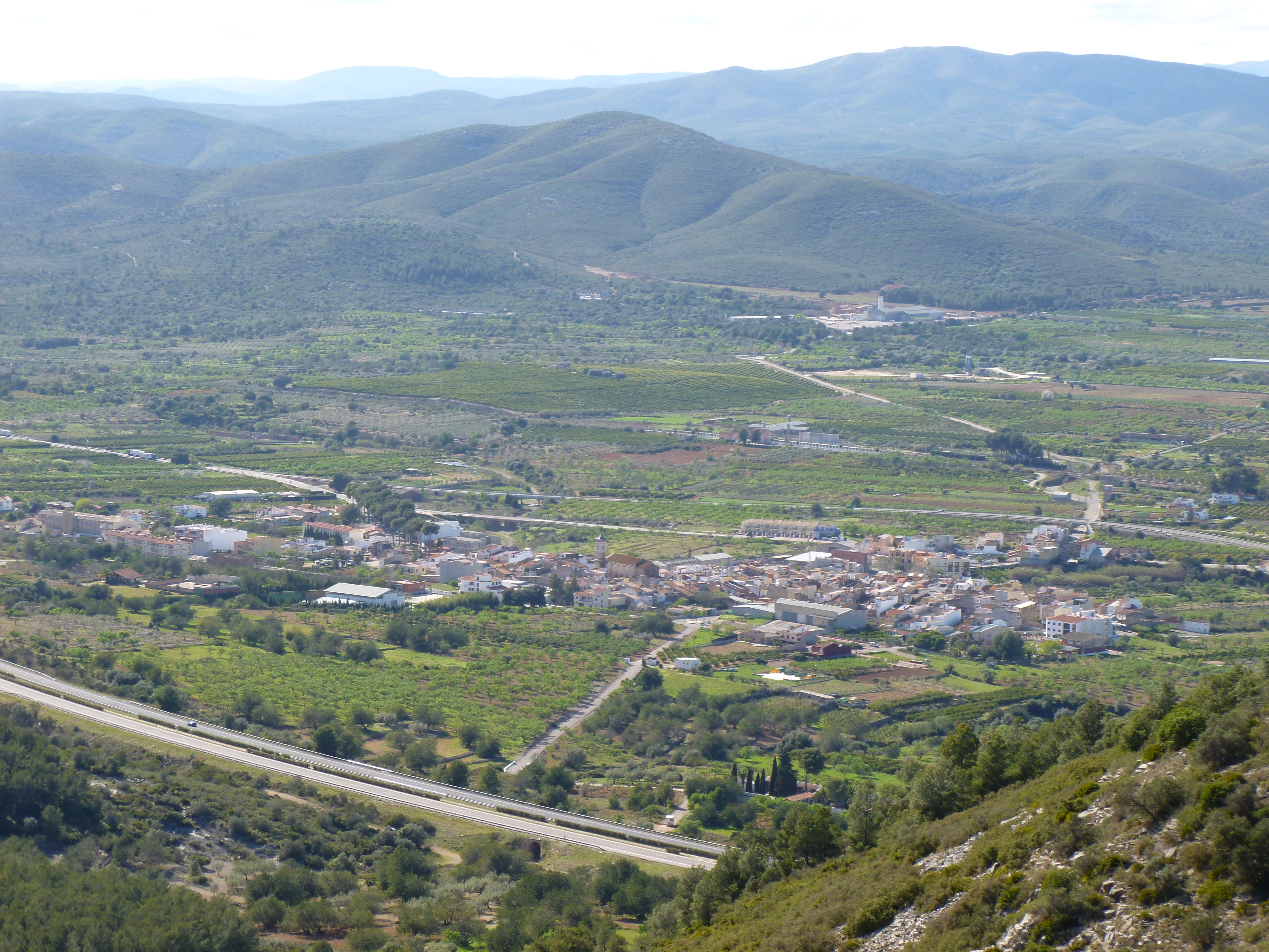 Vista de Santa Magdalena de Polpís desde la pujada al castell